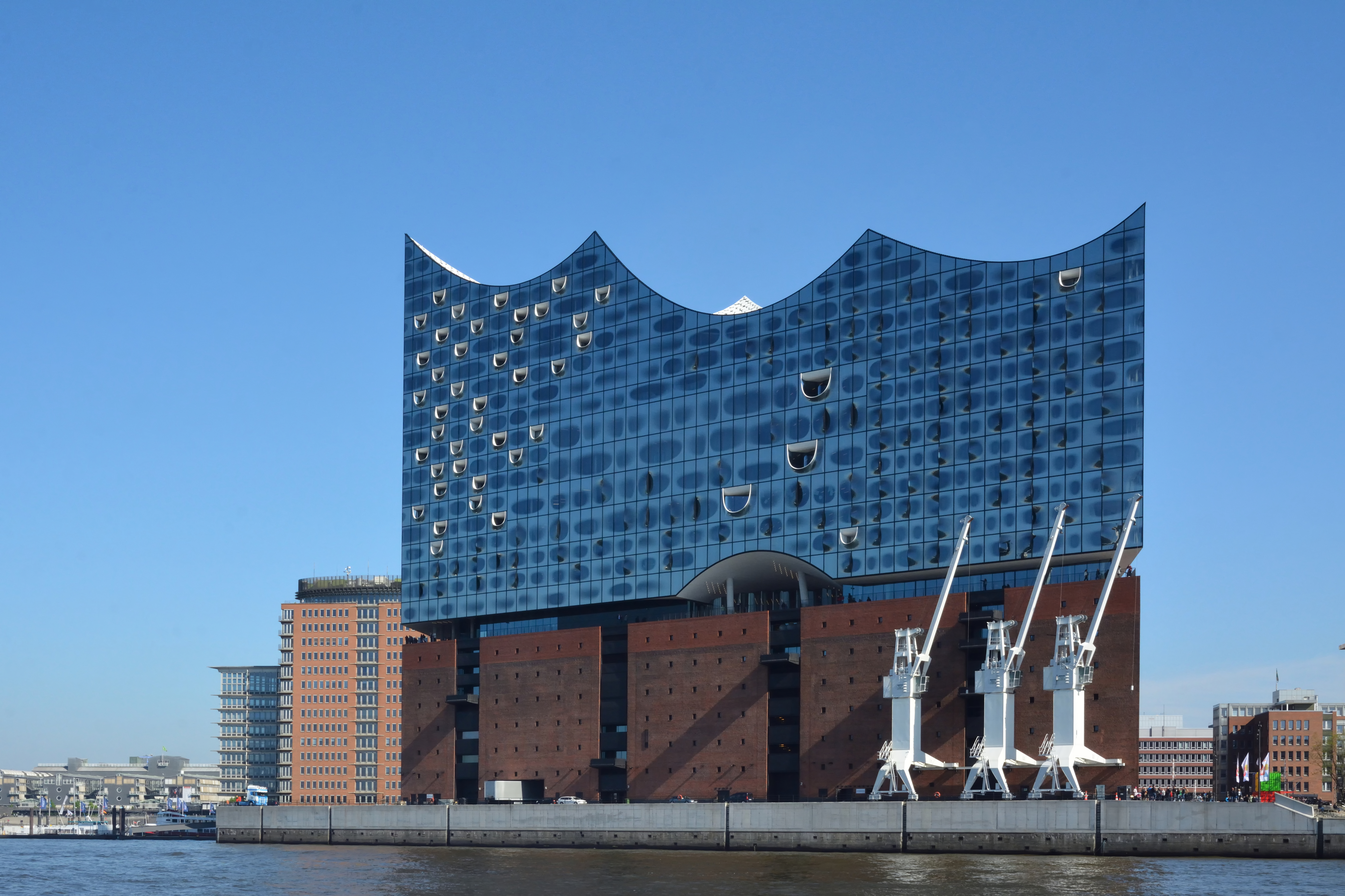 Impressionen eines Wochenendes in Hamburg mit dem Titel: Wikipedia:Ahoi Fotos der Barkassenfahrt am Samstag im Hamburger Hafen.